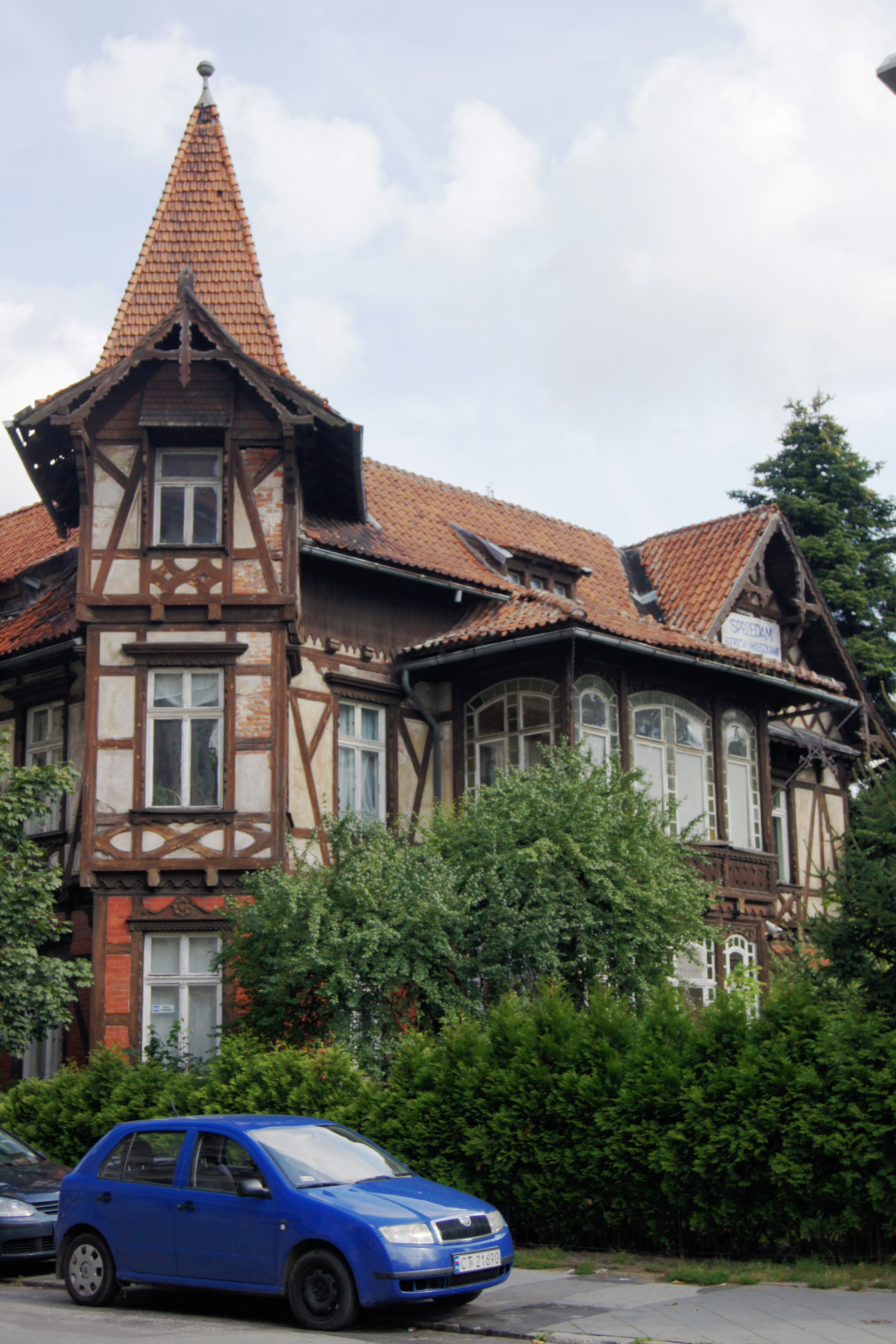 Toruń, ul. Bydgoska 40 (róg Konopnickiej) - willa o konstrukcji szachulcowej z 1895; ogród (zabytek nr A/243)